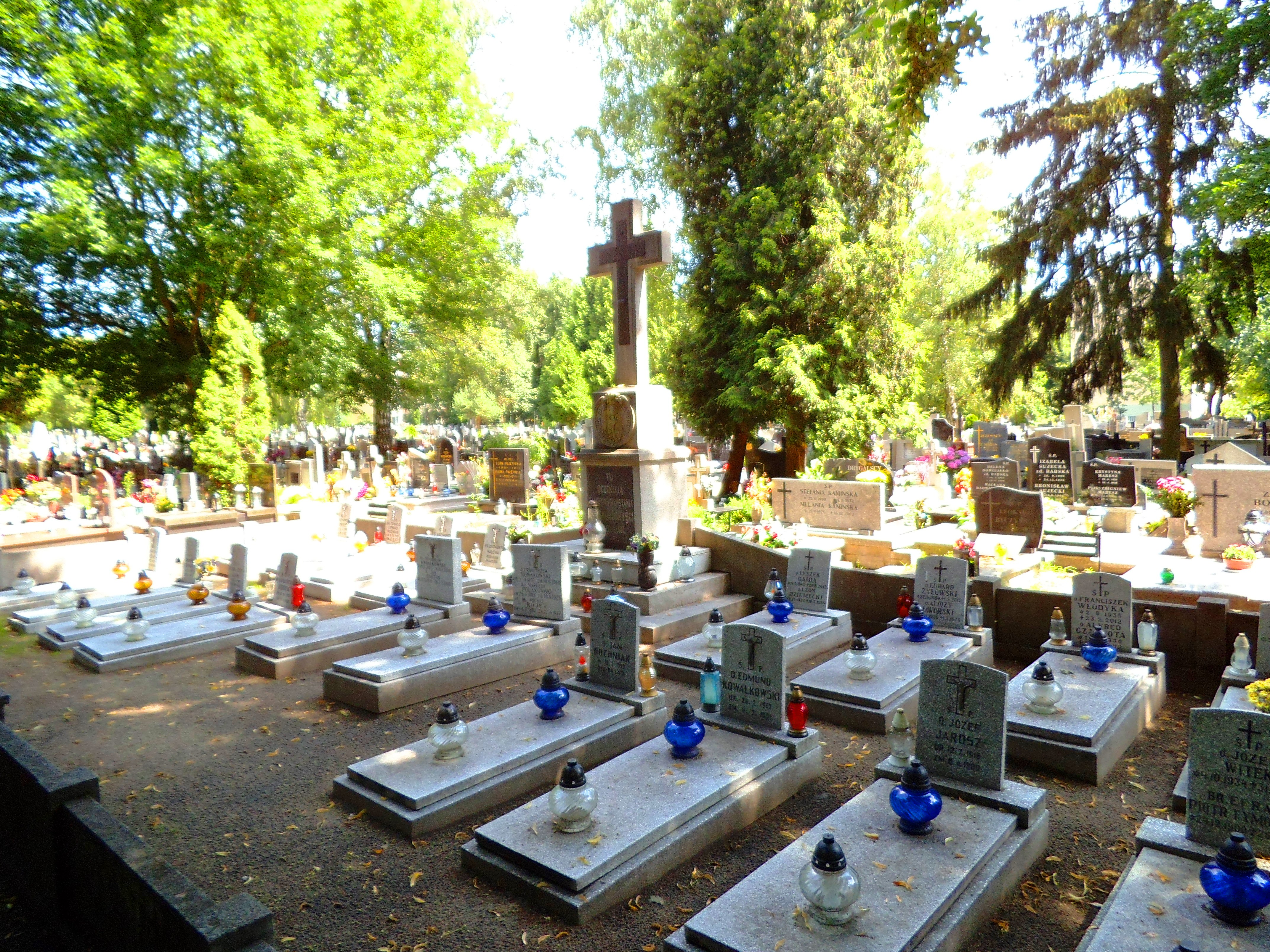 kwatera redemptorystów na Cmentarzu NMP w Toruniu